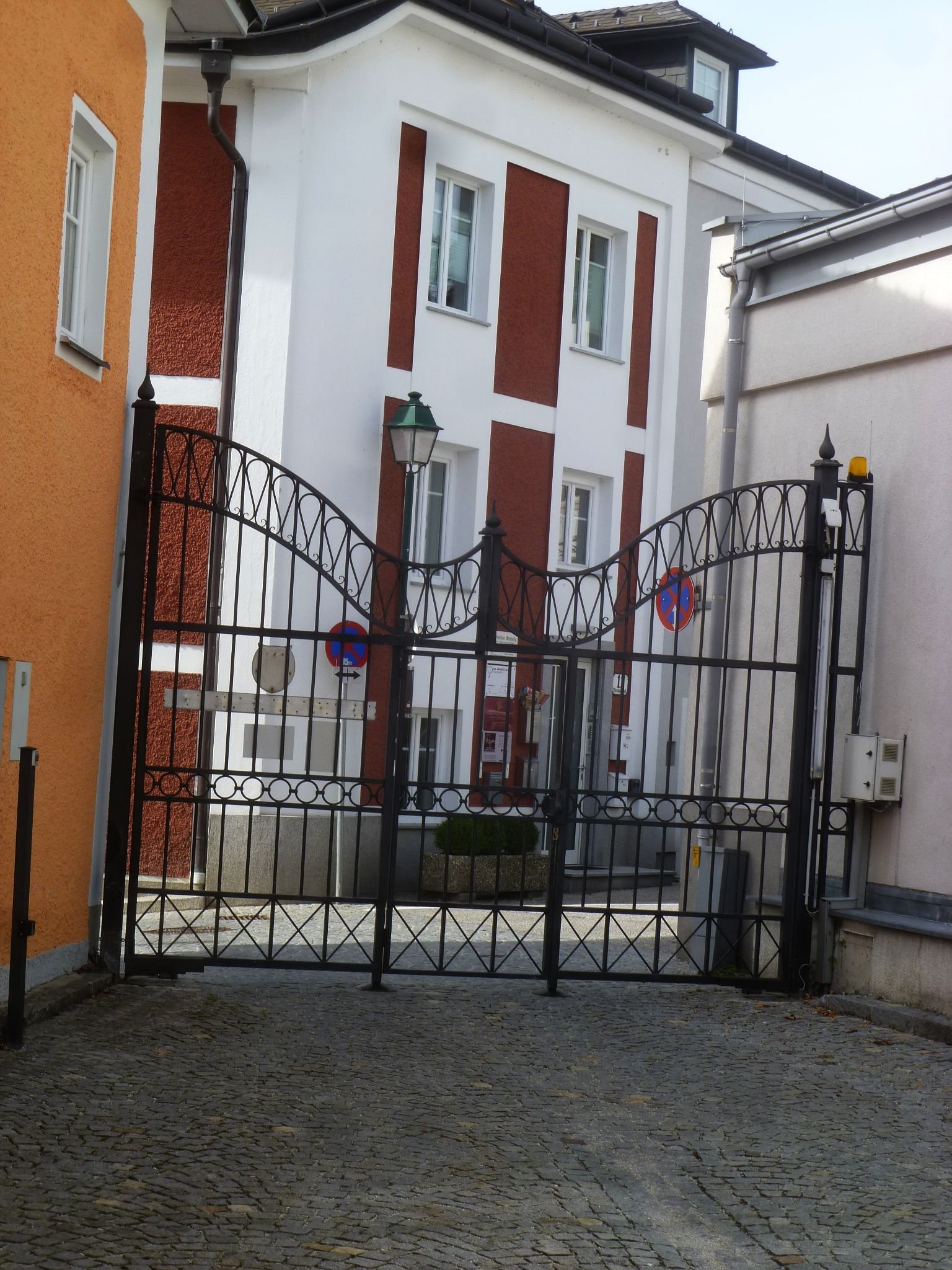 Bezirksgericht Gmunden, ehem. Schloß Grueb